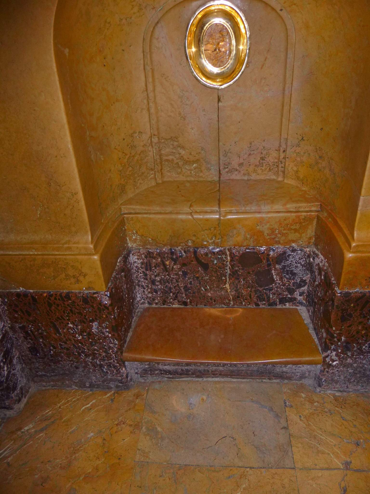 Zaragoza - Basílica del Pilar